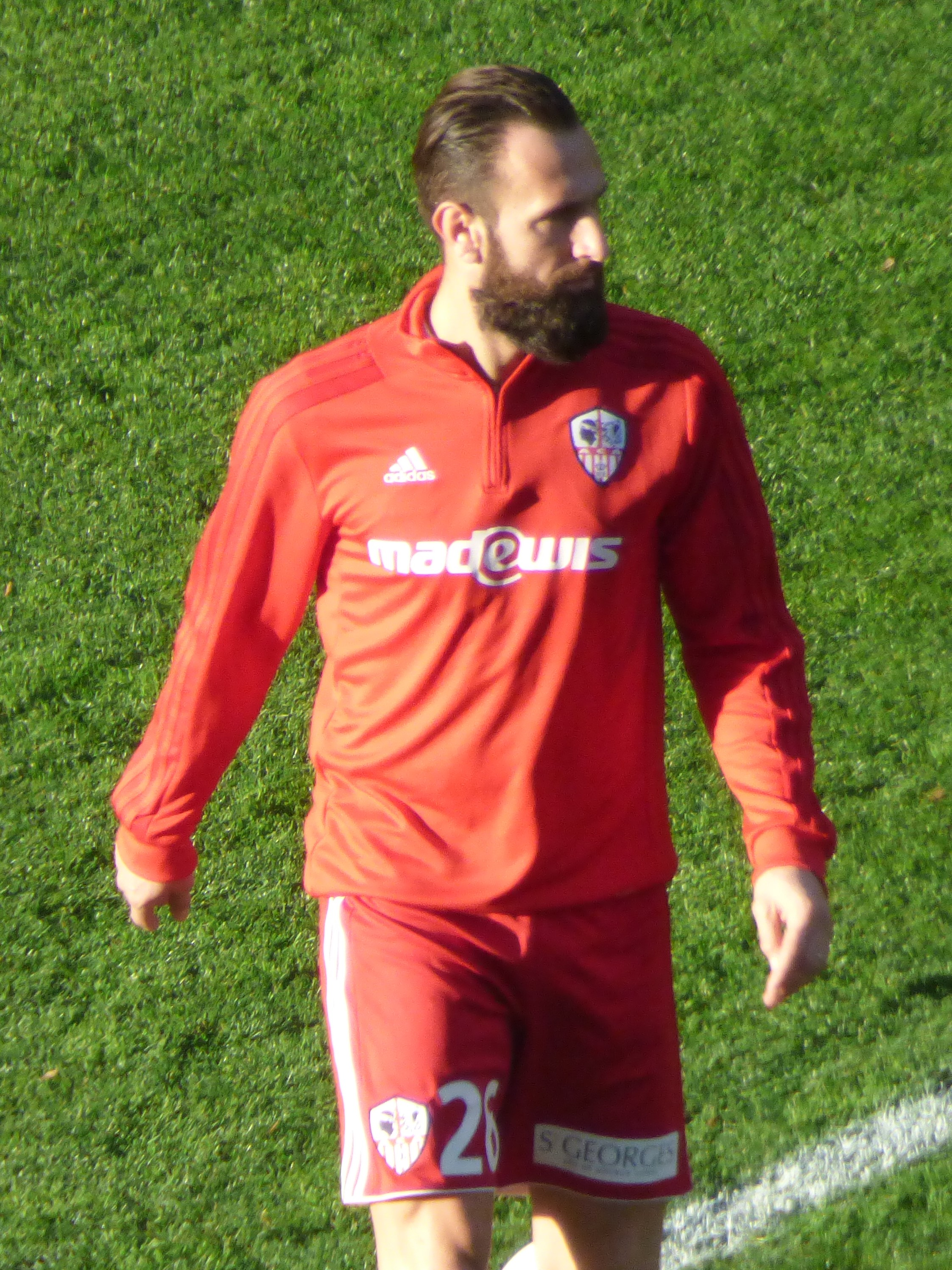 Ghislain Gimbert avant le match RC Lens - AC Ajaccio, comptant pour la dix-neuvième journée du championnat de France de Ligue 2 2018-2019, le 22 décembre 2018, au Stade Bollaert-Delelis de Lens.